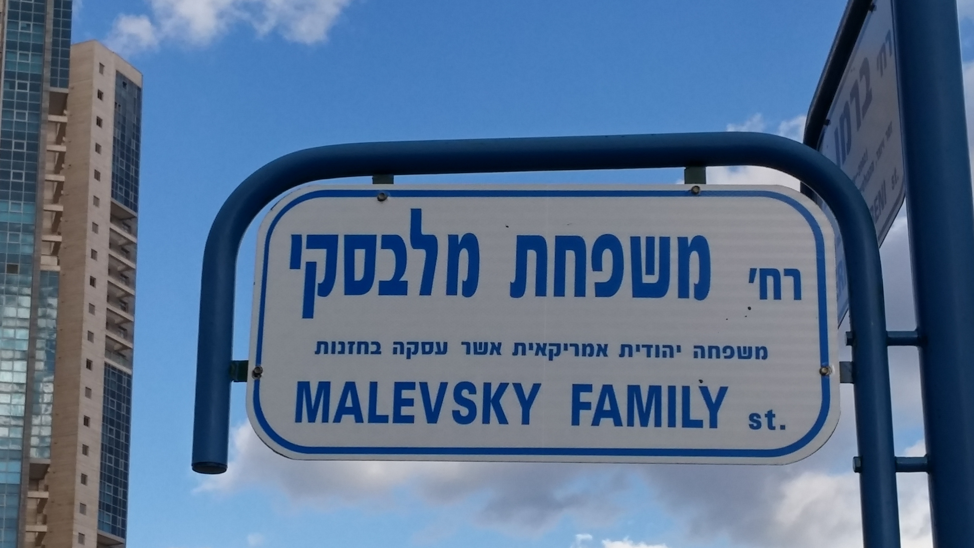 רחוב משפחת מלבסקי בשכונת עיר ימים, נתניה